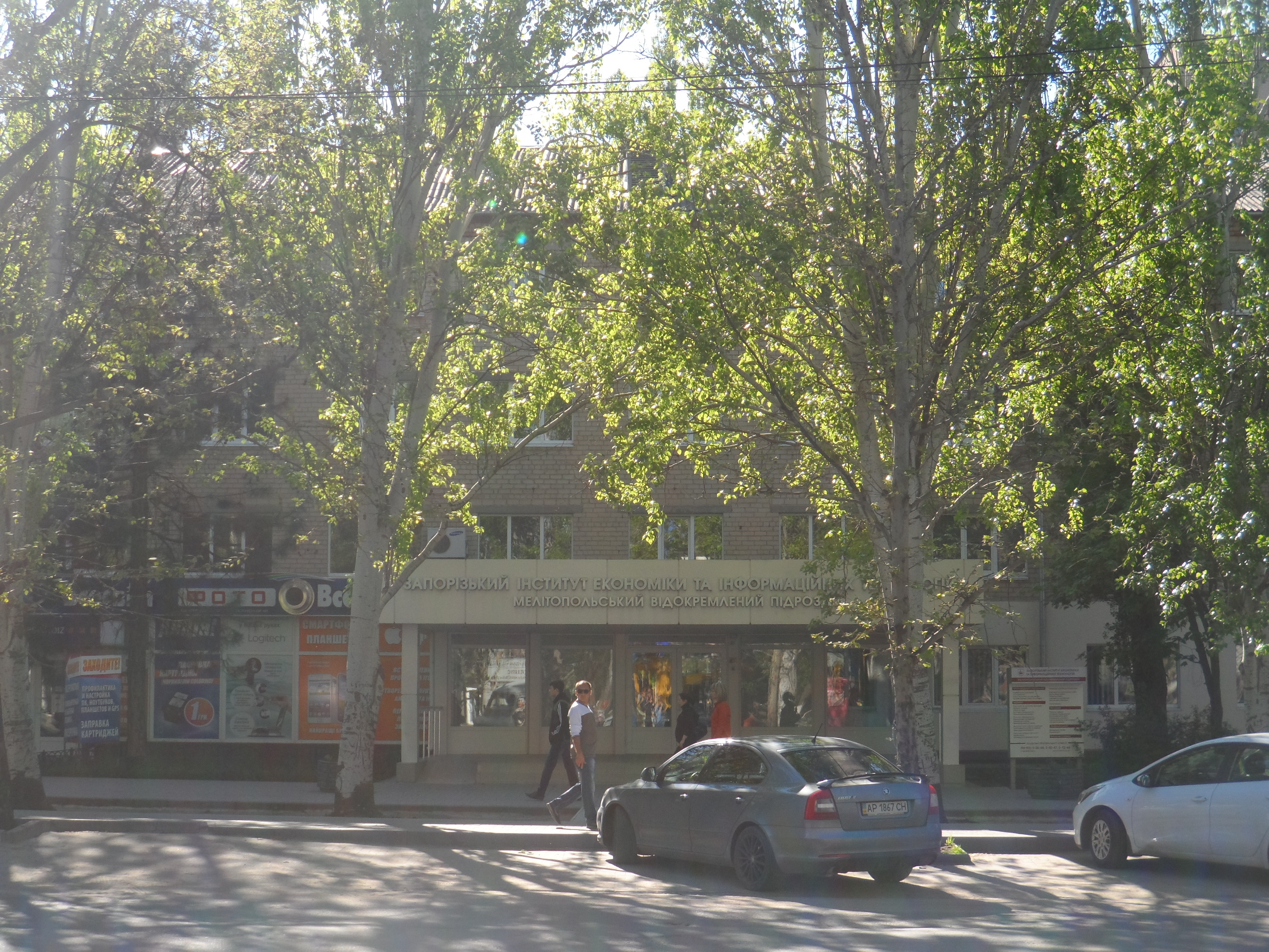 Мелитополь Мелитопольское обособленное подразделение